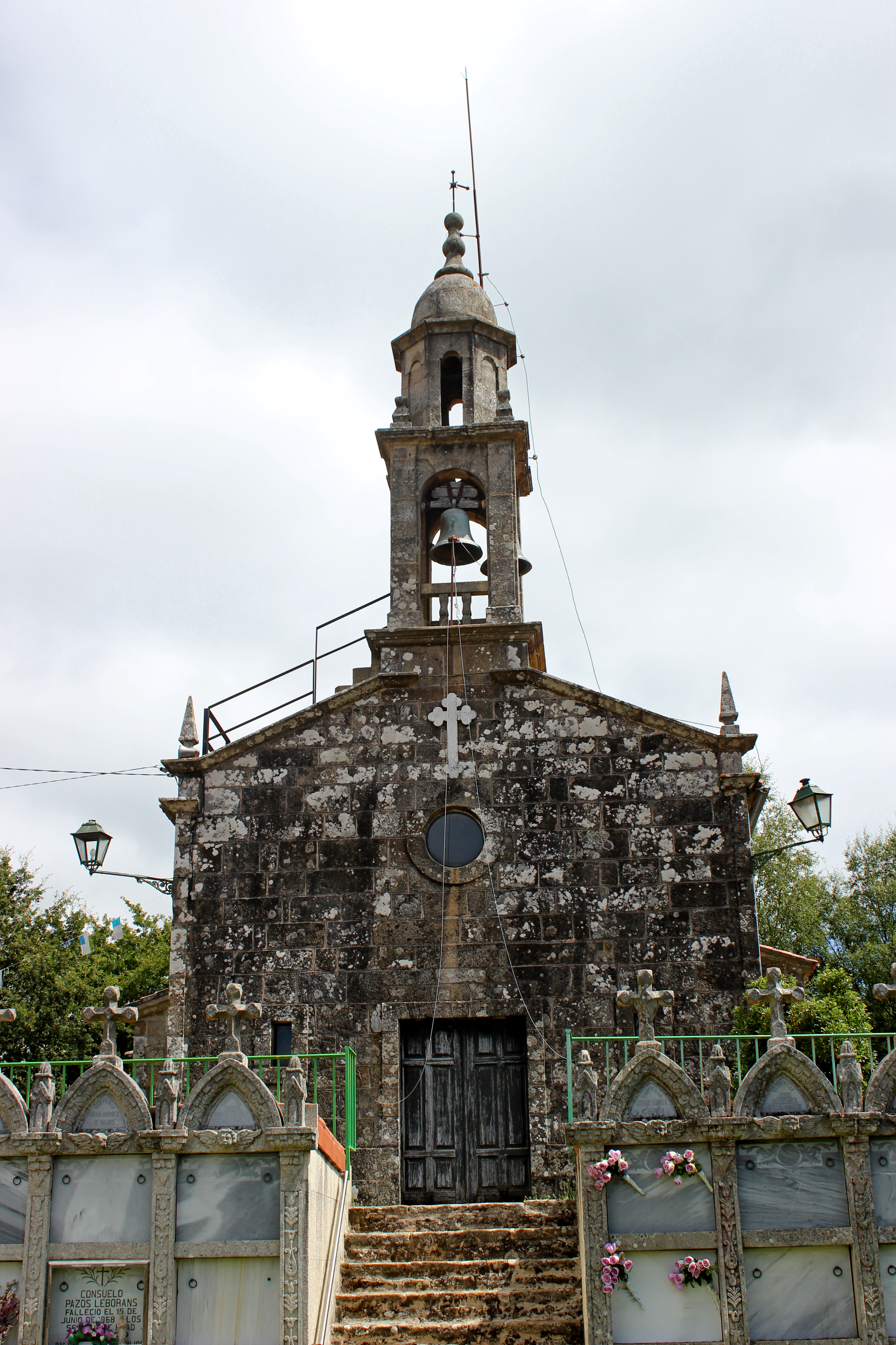 Igrexa de Busto, Santiago de Compostela.